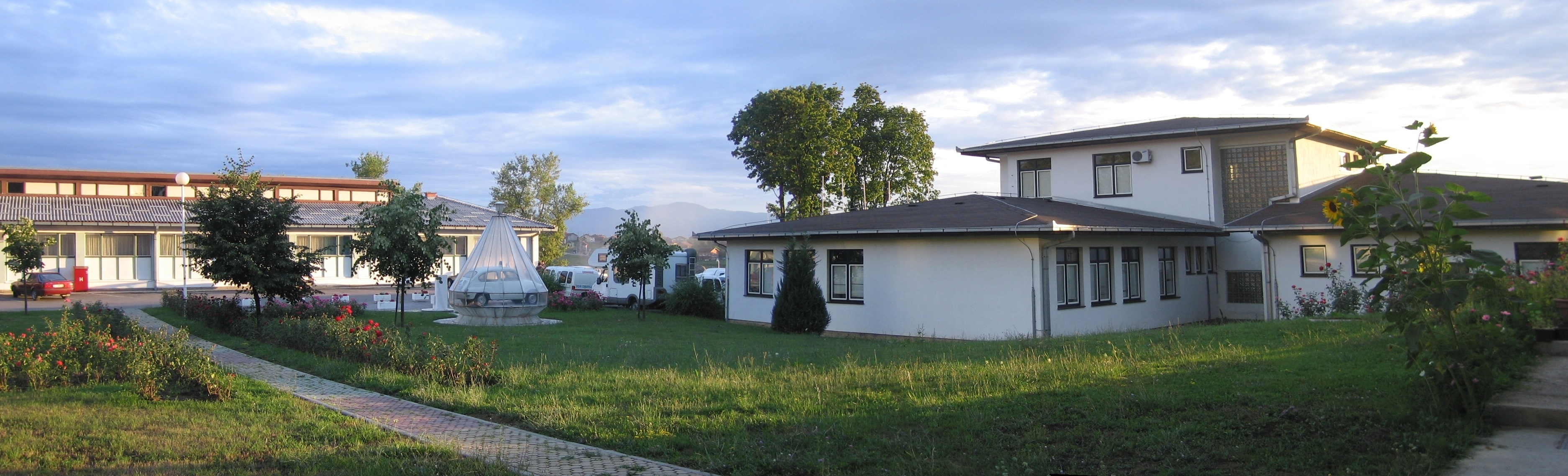 Dom zdravlja Cazin